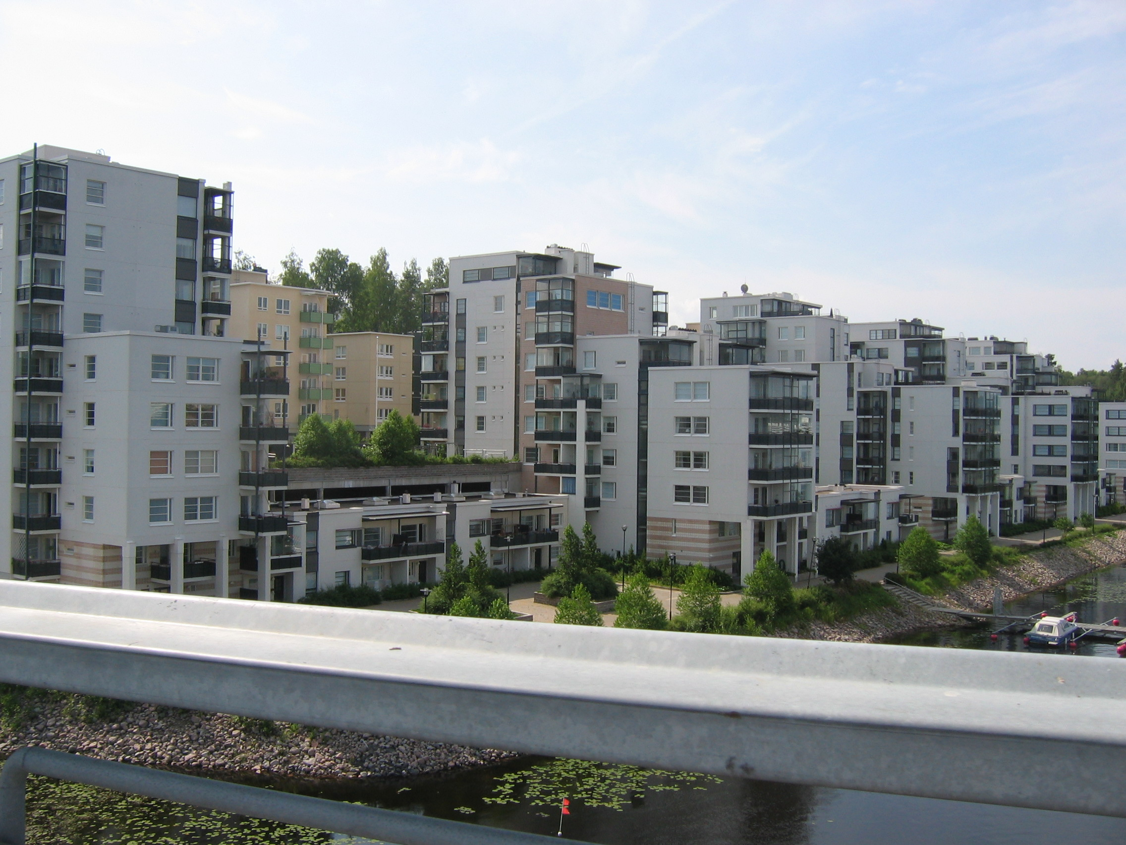 Kuokkalan kaupunginosa Jyväskylässä